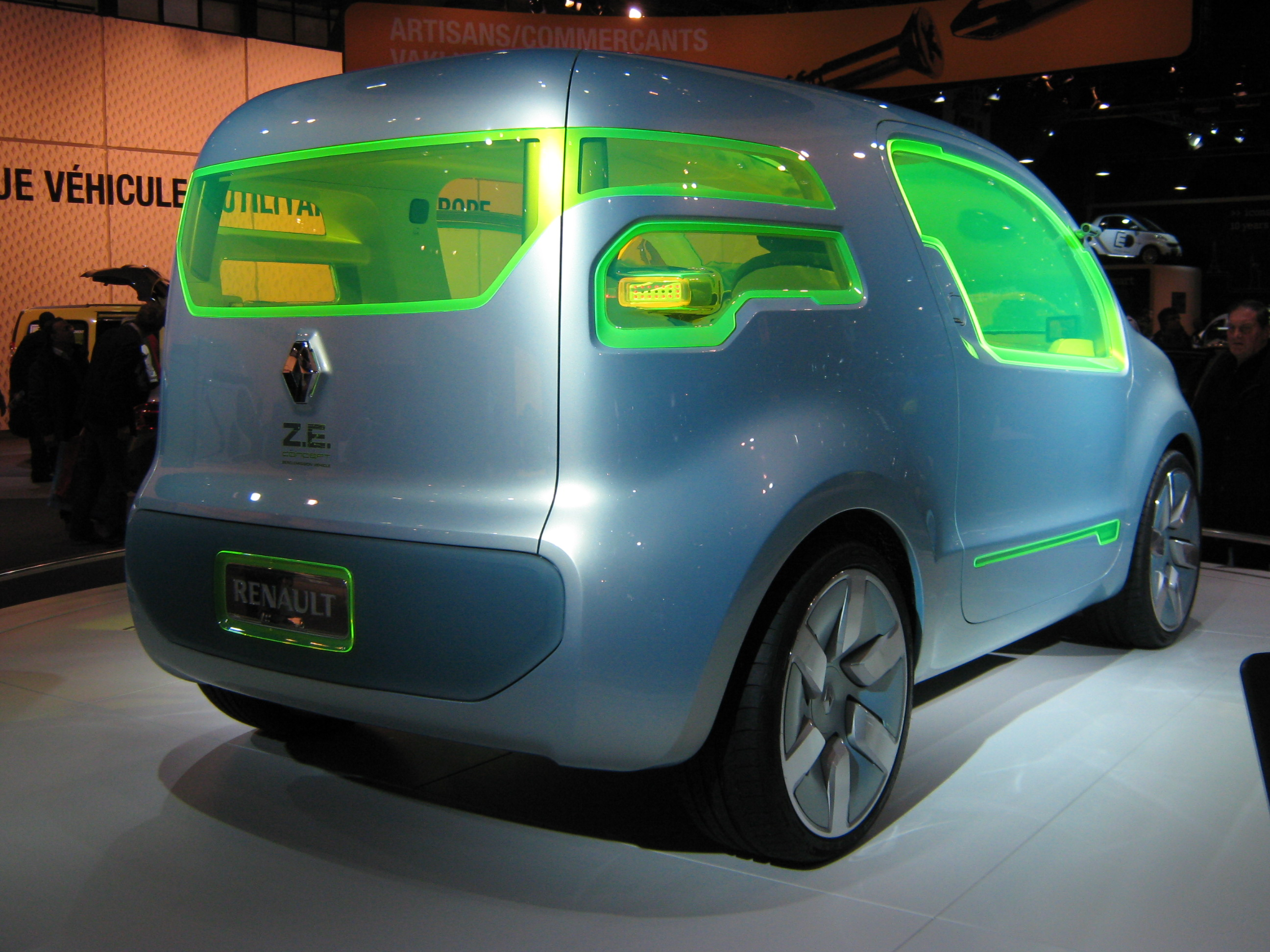 Renault ZE Konzeptfahrzeug beim Brüsseler Autosalon 2009